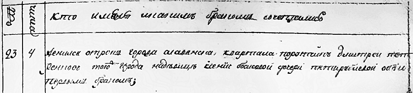 Дід Михайла Петренка